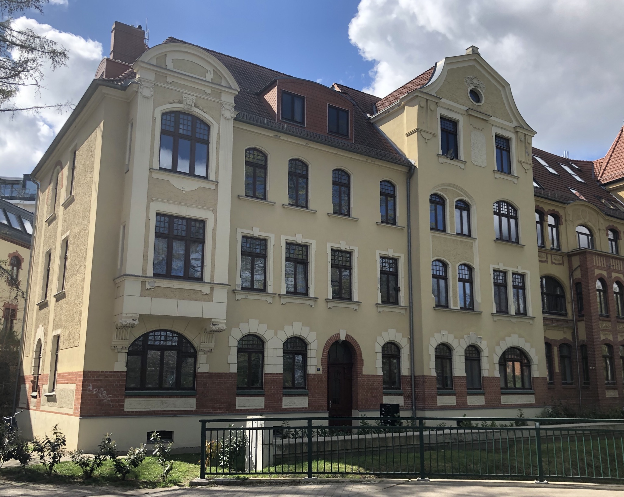 Benediktinerstraße 5